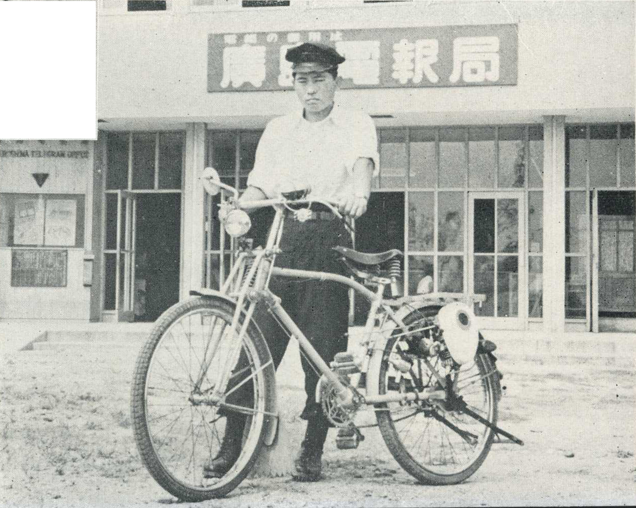 広島電報局の配達人。